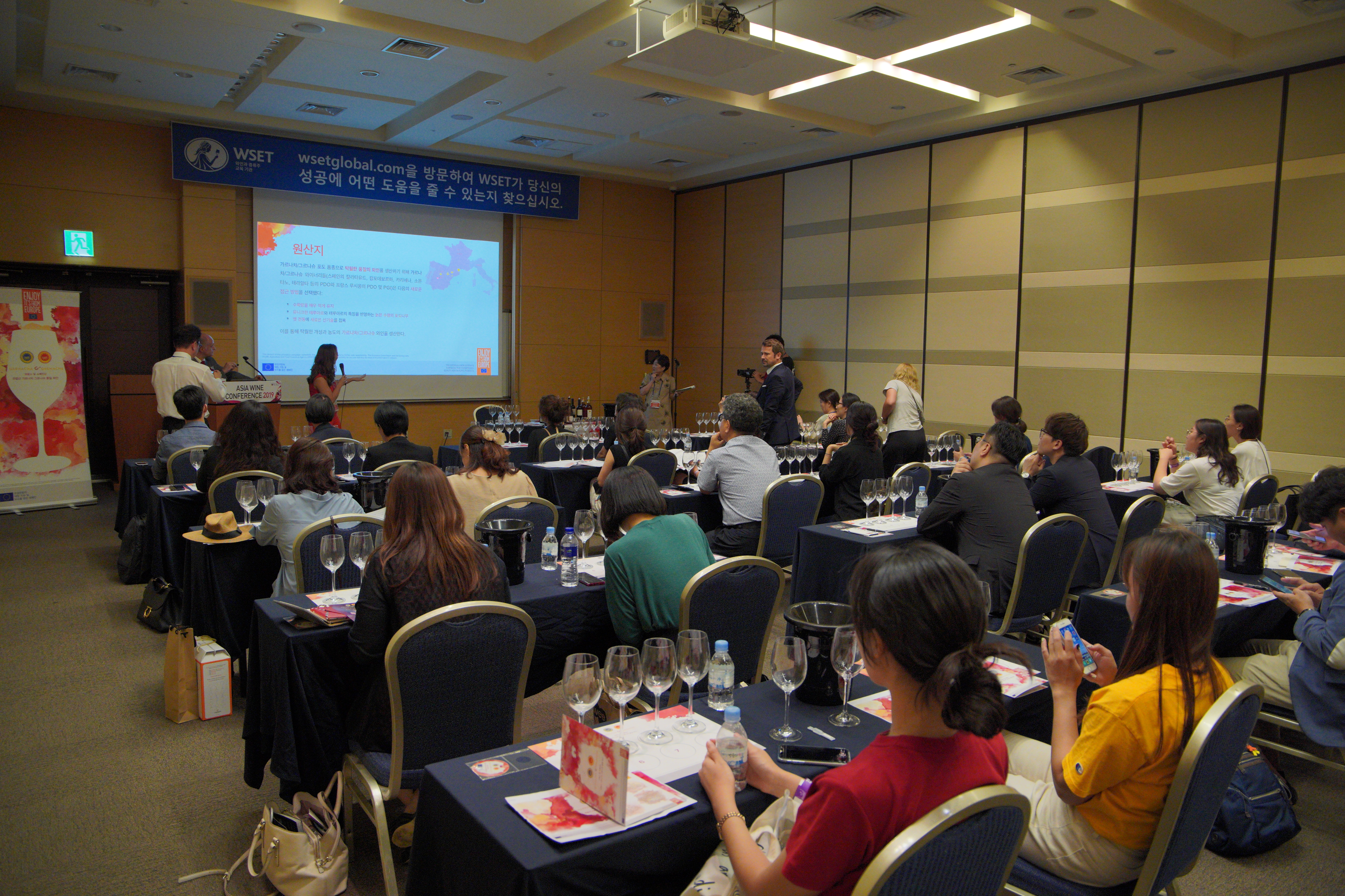 2019 대전국제와인페스티벌 (19)